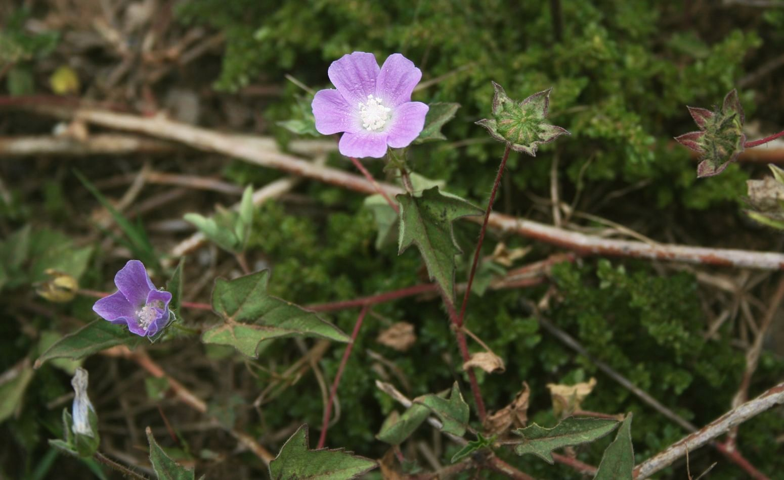 Anoda cristata, Malvengewächse (Malvaceae) - Costa Rica: Prov. Cartago, Paraíso, Jardín Botánico Lankester/Lankester Botanical Garden, Zufahrtsstraße zum Garten